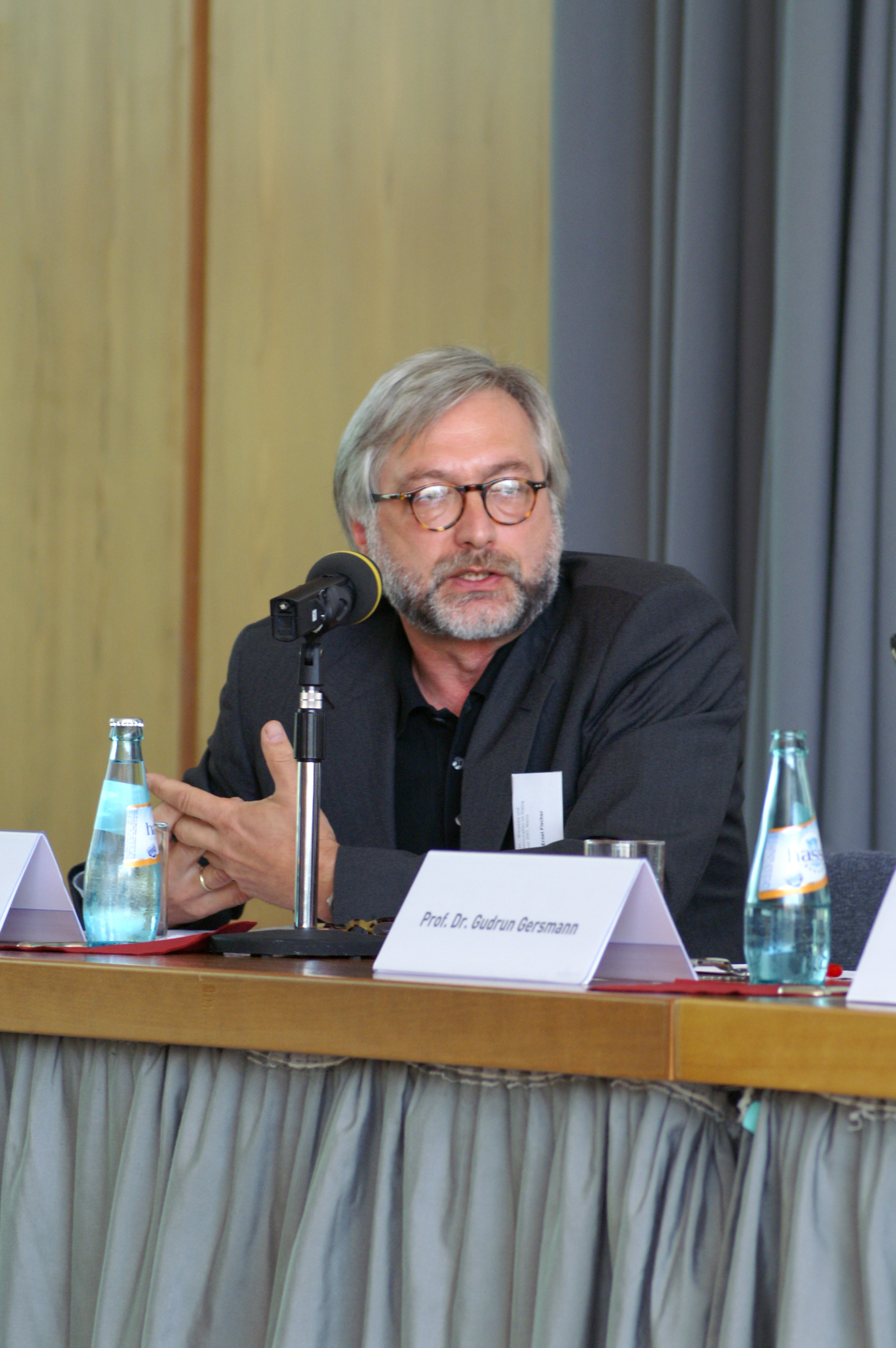 Pictures from Wikipedia Academy Mainz 24./25. August 2007 Prof Fischer während der Podiumsdiskussion